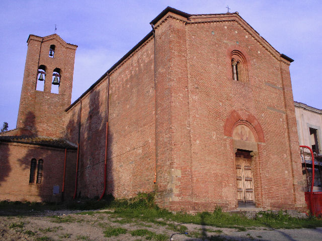 Pieve di Castelfiorentino